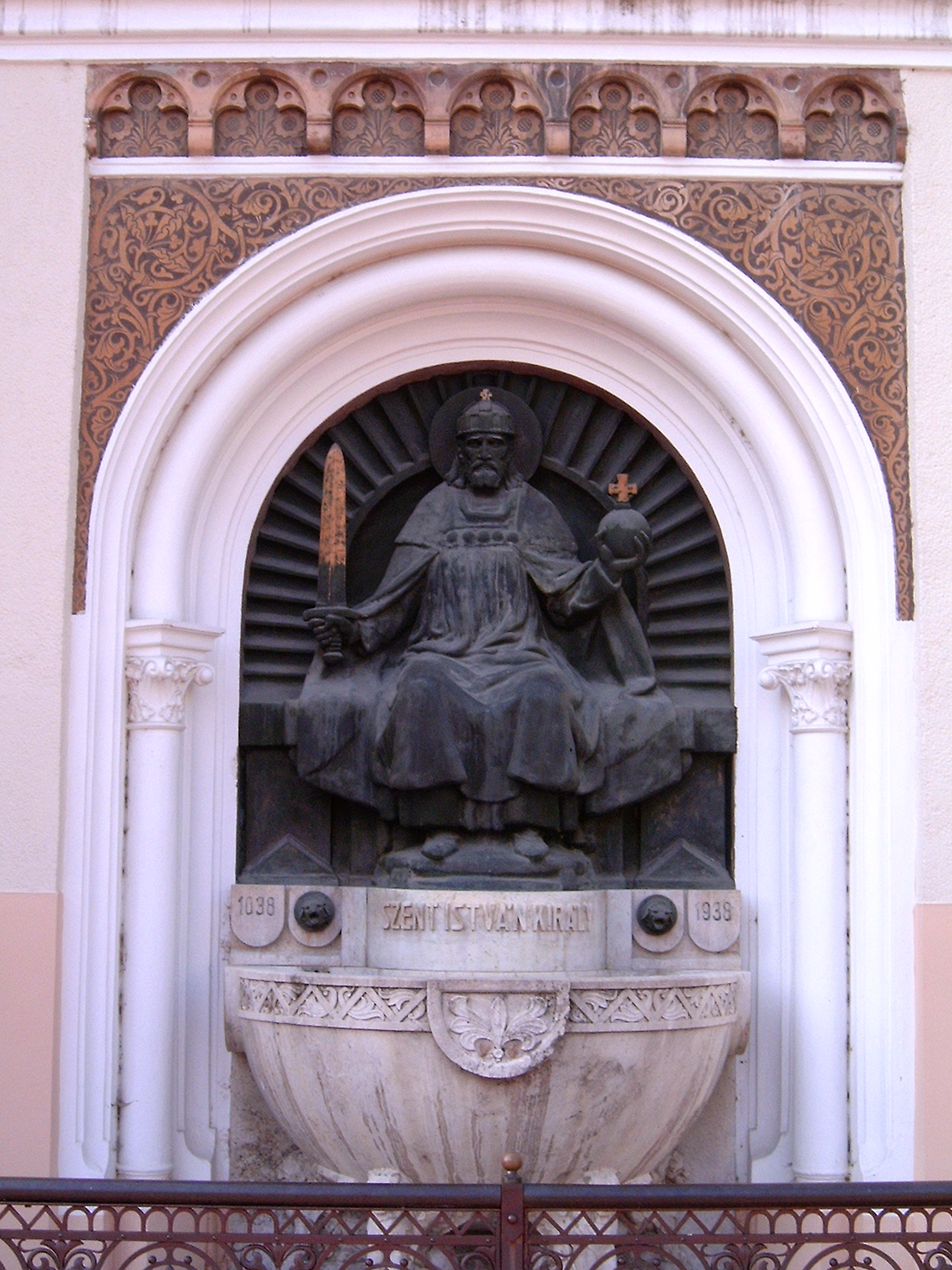 Bory Jenő: Szent István-kút, Kaposvár főterén, a Nagyboldogasszony-templom oldalában található